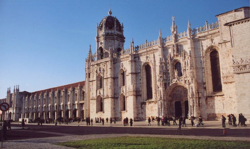 Klasztor Hieronimitów w Lizbonie